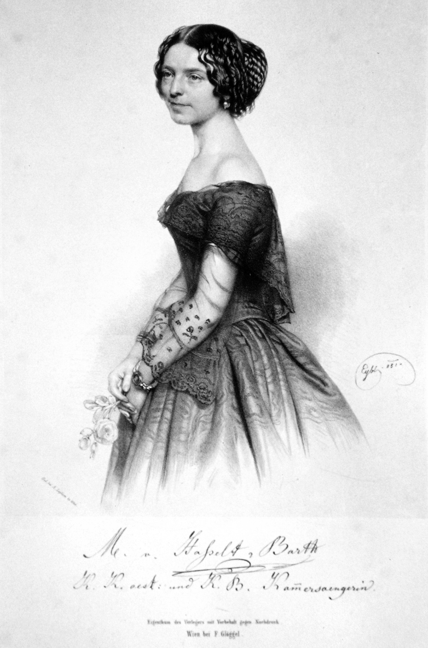 Anna Maria Wilhelmine van Hasselt-Barth (1813-1881), deutsche Sängerin. Lithographie von Franz Eybl, 1851